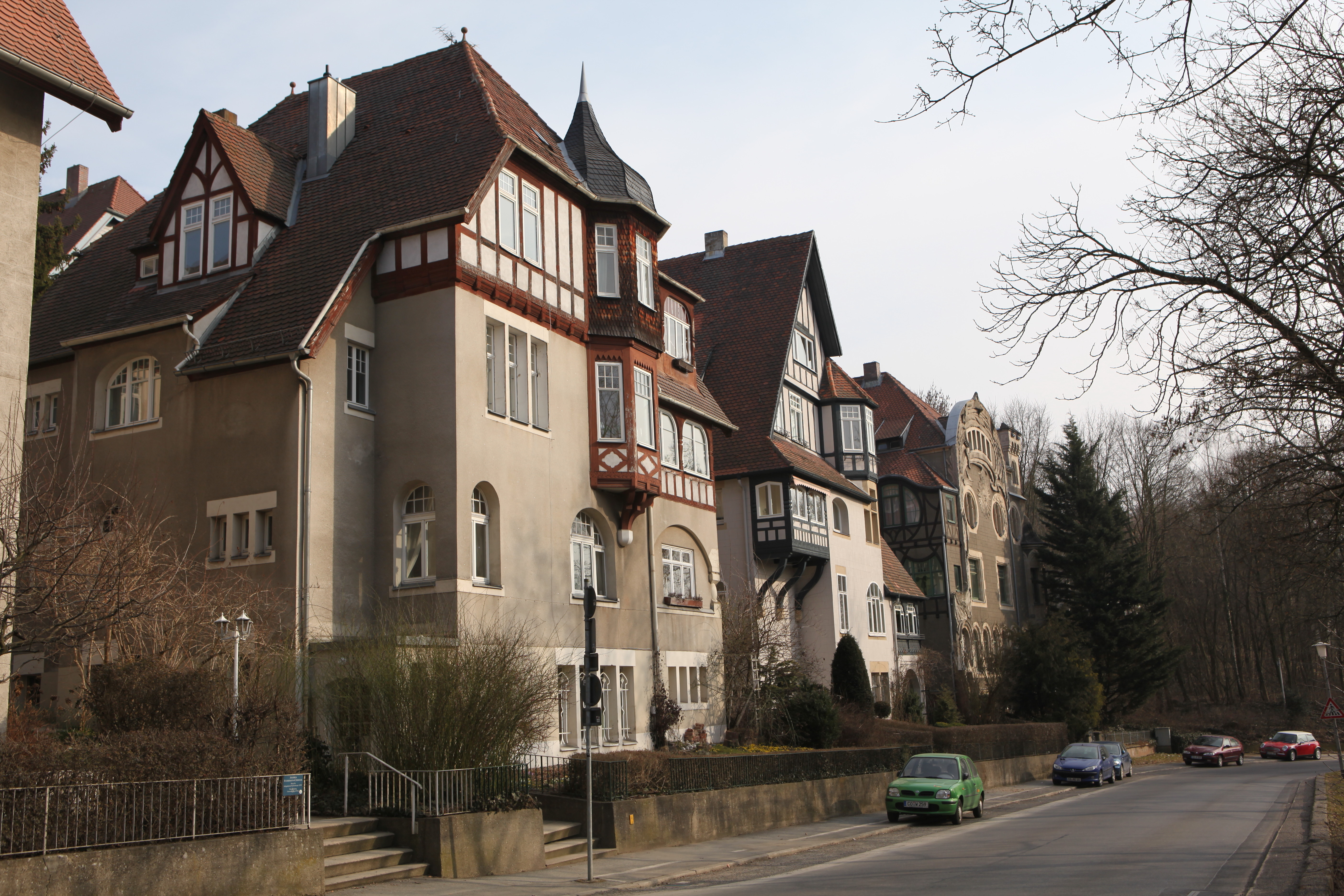 Alexandrinenstraße in Coburg